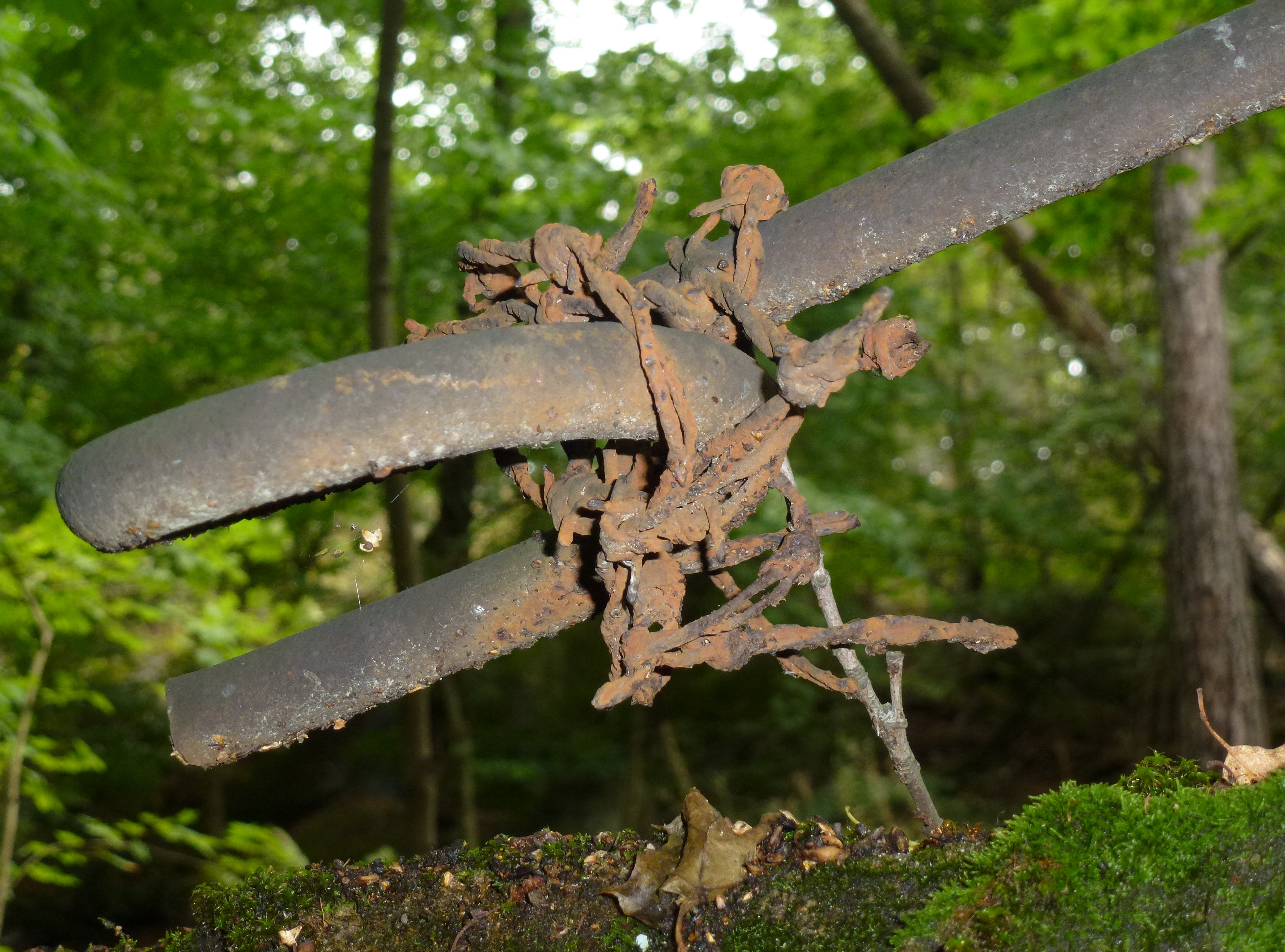 Norra Djurgårdens stridsvagnsspärr vid Stora Skuggan öster om Laduviken